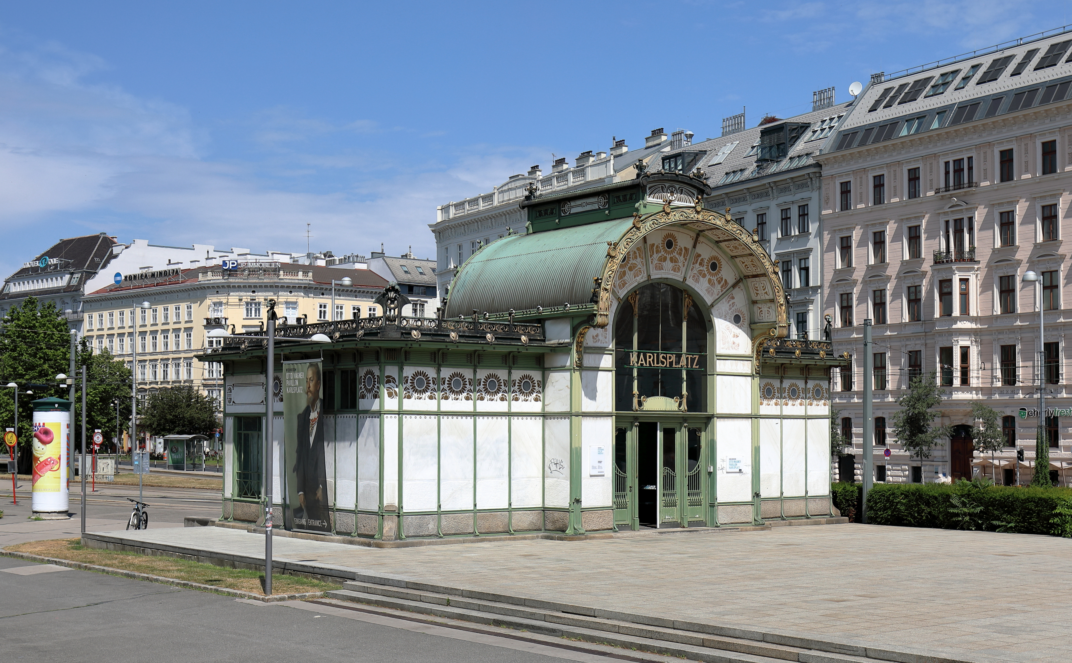 Ostansicht des ehemaligen westlichen Stadtbahn-Pavillons am Karlsplatz im 4. Wiener Gemeindebezirk Wieden.1898 wurden nach einem Entwurf von Otto Wagner zwei identische Zugangsgebäude für die Stadtbahnstation Karlsplatz errichtet. Die vielen dekorativen Details machten die Station zu einem Musterbeispiel des Wiener Jugendstils. Metall und Holz wurden in Apfelgrün gestrichen, der Signalfarbe der Stadtbahn. Hinzu kam Gold und weißer Marmor an der Außenseite. Durch den Bau der U-Bahn-Station Karlsplatz wurden die Pavillons abgetragen und nach Protesten 1977 wieder aufgestellt. Aktuell (2018) wird der westlich Pavillon von Wien Museum genutzt und der östliche als Kaffeehaus.